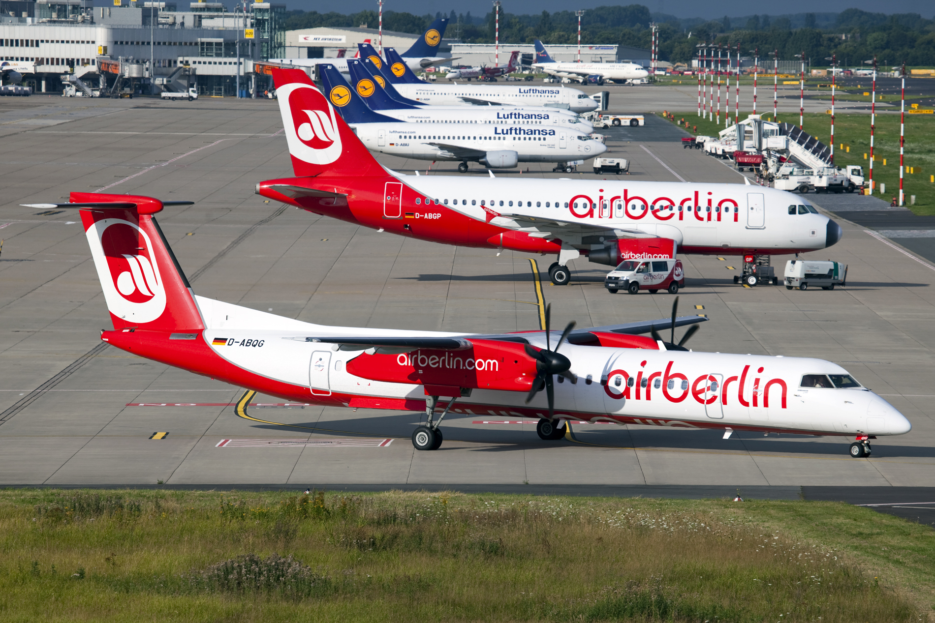 Dusseldorf